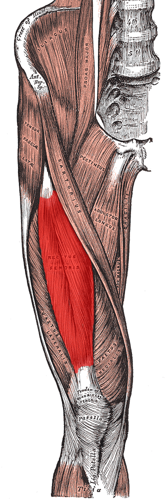 Rectus femoris muscle